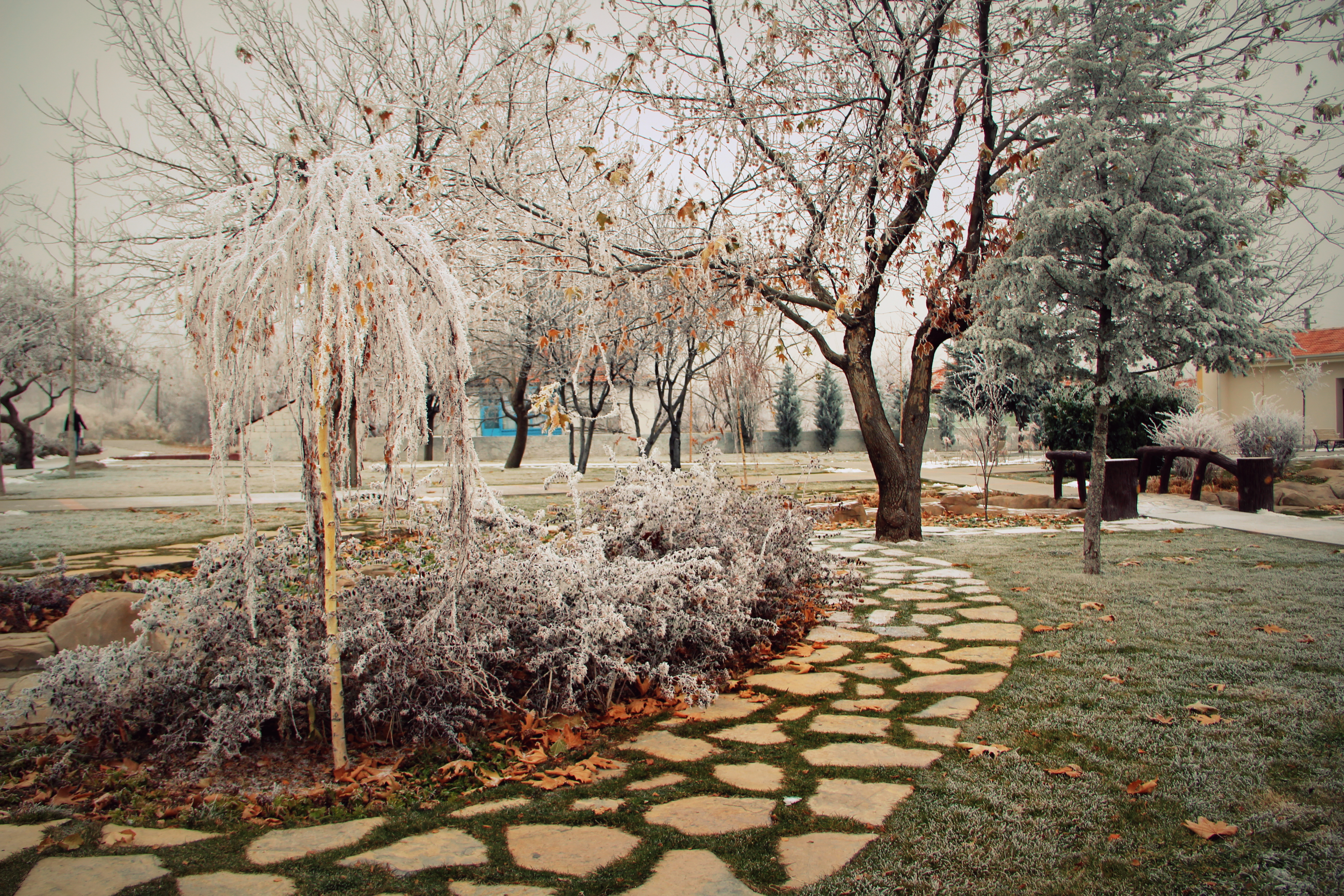 Winter in Hilla Park